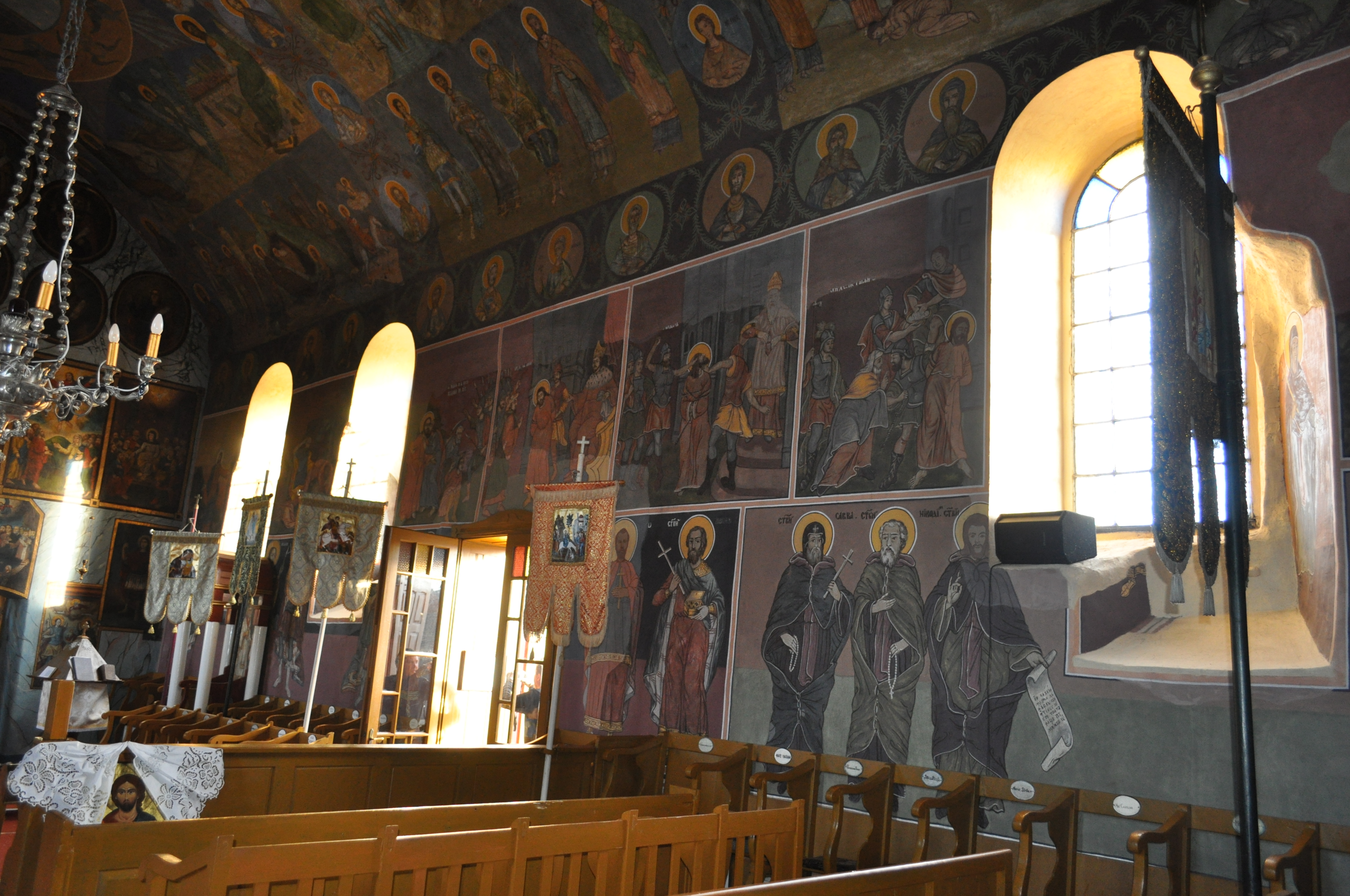 Biserica „Nașterea Maicii Domnului" din Hălmagiu, județul Arad